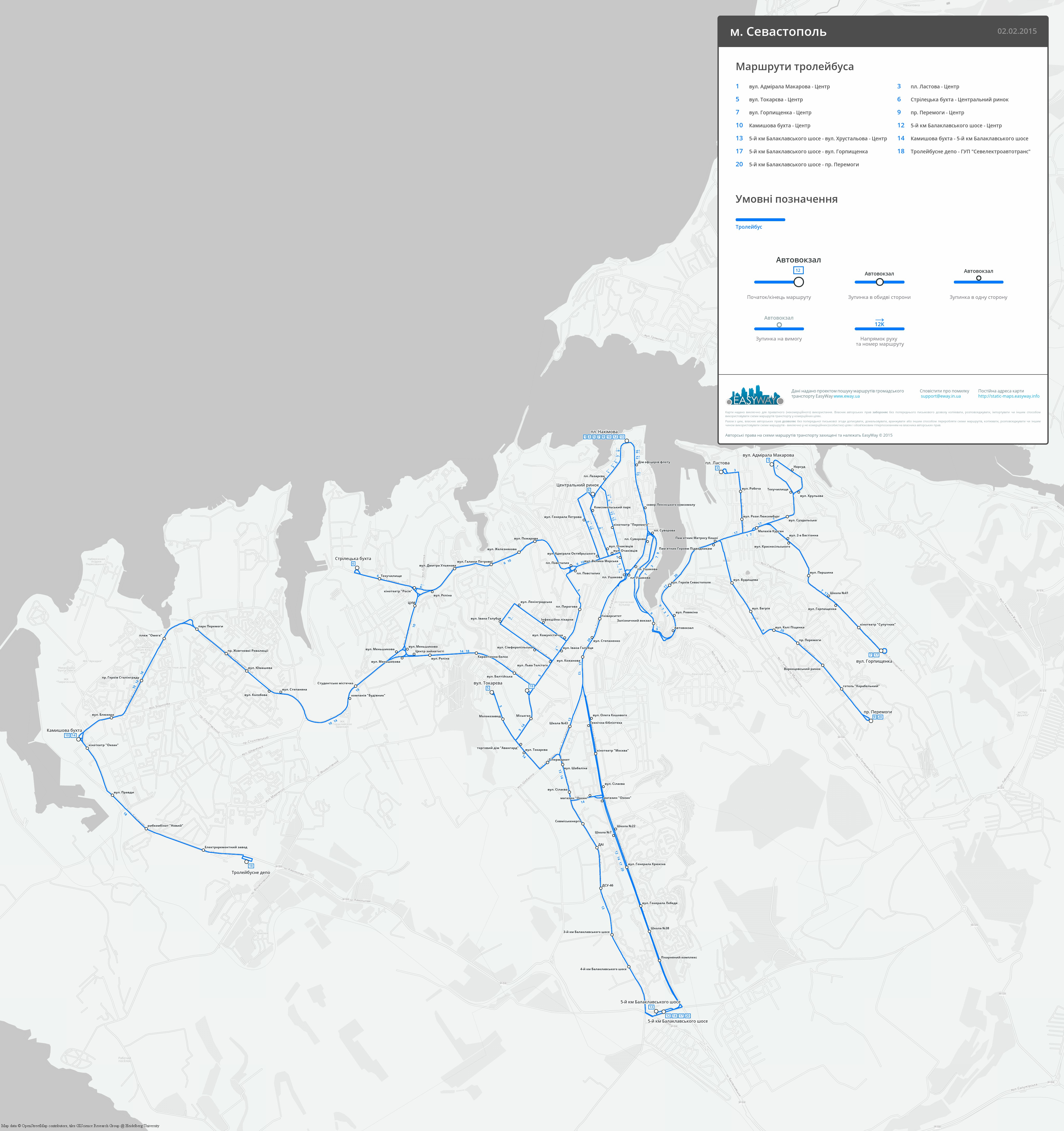 Схема тролейбусних маршрутів міста Севастополь